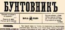 Вестникът на ВМОРО "Бунтовник".